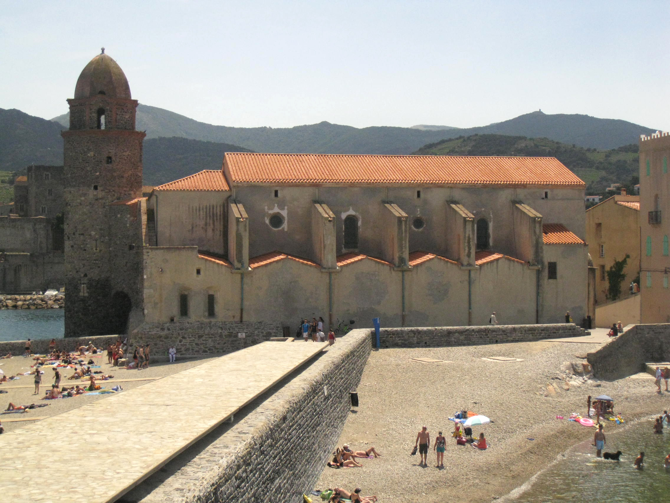 Església de Santa Maria i torre contigua amb rellotge (Cotlliure)